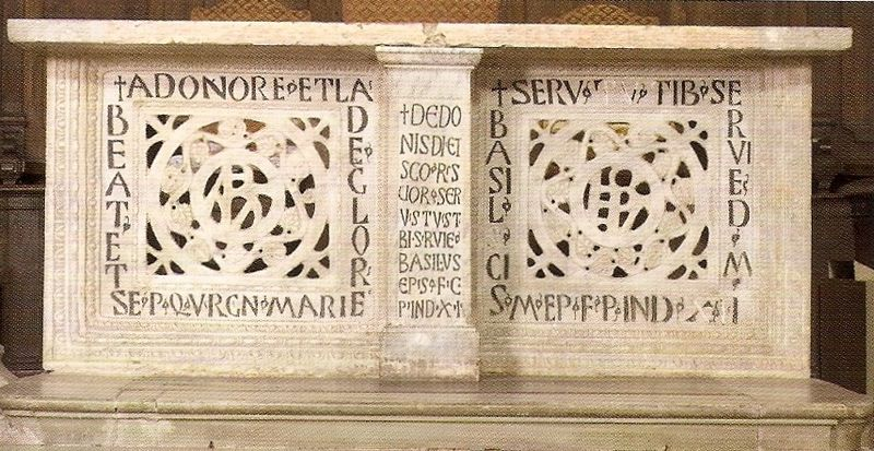 Paliotto d'altare. Datazione secc. VI-VII. Materiale: marmi bianchi di riutilizzo; manifattura: nella parte orientale dell'impero romano Collocazione: Imola, chiesa di Santa Maria in Regola. L'epigrafe sulla colonnetta recita: De donis Dei et sanctorum suorum servus tuus tibi serviens Basilius episcopus fecit per indictionem XI. Sulla fornella di sinistra si legge: Ad onorem et laudem beate et gloriose semperque virginis Marie. Sulla formella di destra: Servus tuus tibi serviens dominus Basilius sanctissimus episcopus fecit per indictionem XII.